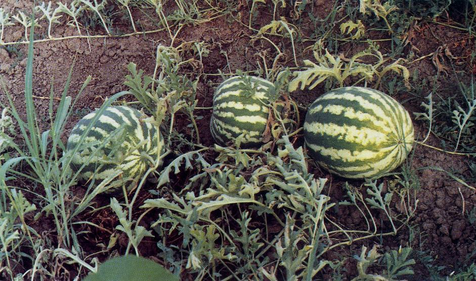 Küllük watermelon